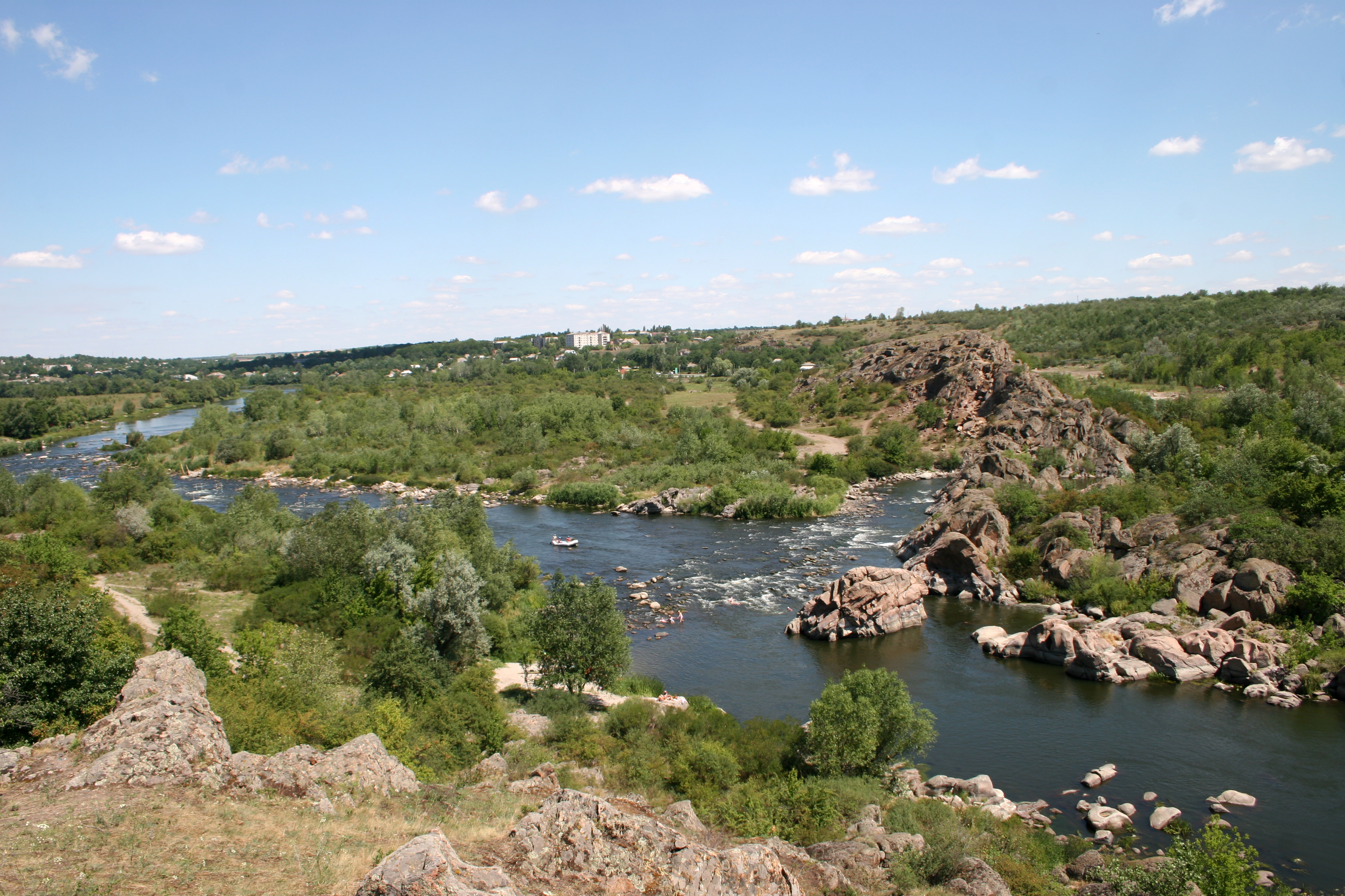 Canon EOS 20D